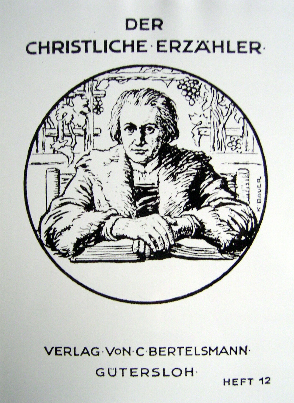 Der christliche Erzähler, Heft 12, unbekannter Band